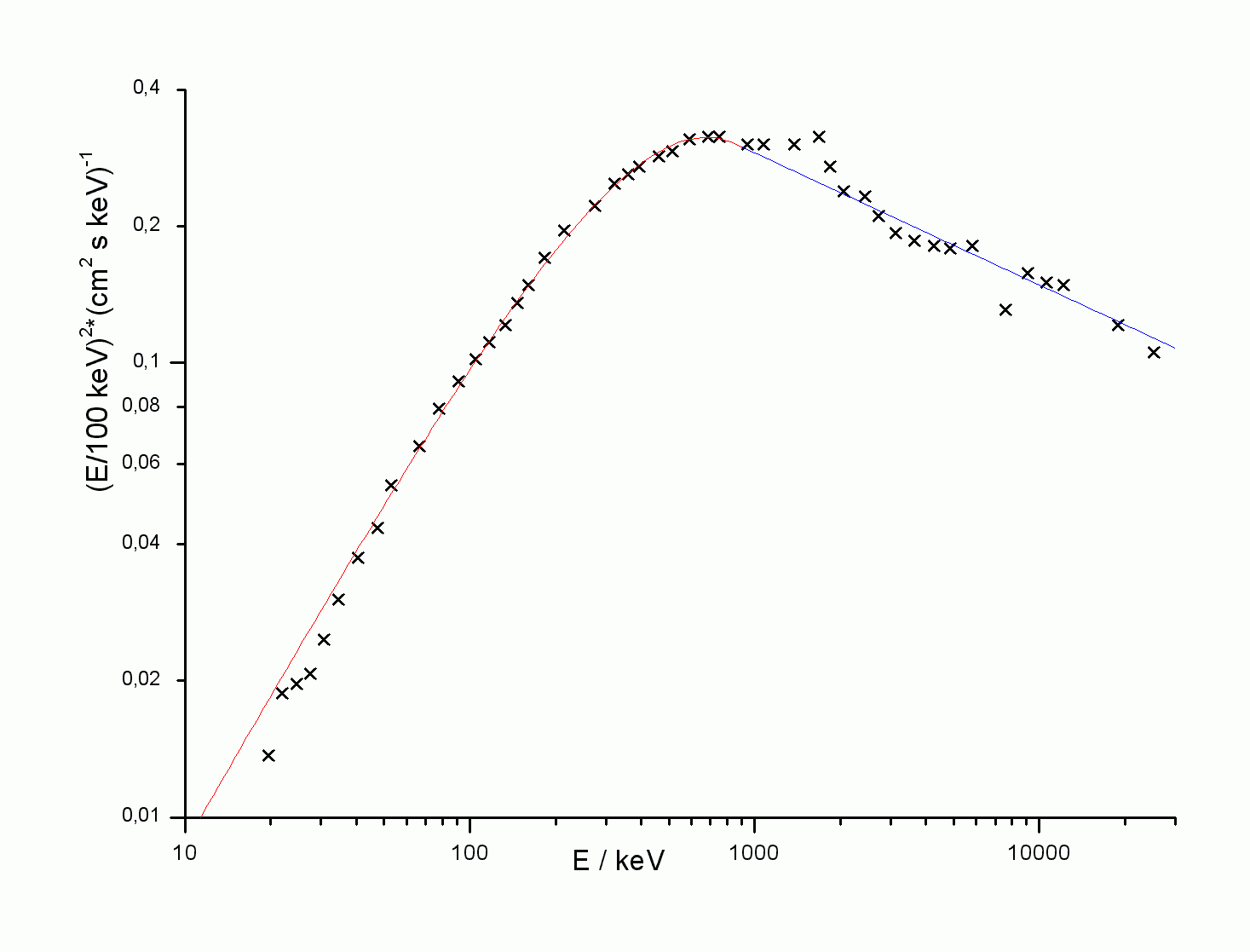 Leistungsspektrum des GRB 910503 mit 2 Fits, exponentiell im Bereich niedriger Energien und linear im Bereich hoher Energien